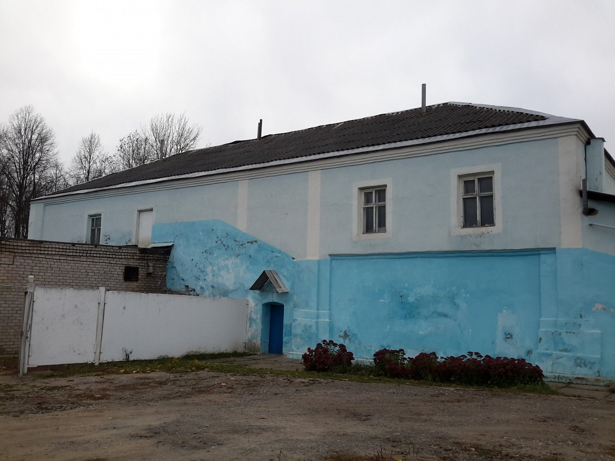 Сянно. Гістарычныя забудова